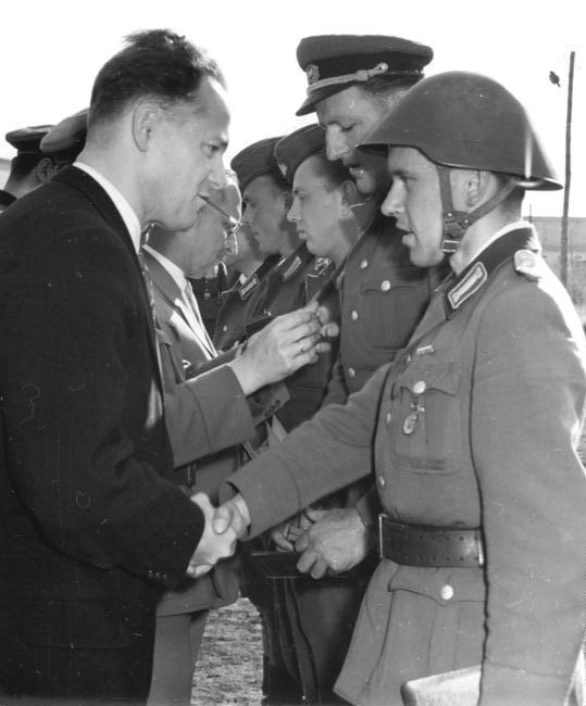 ADN-ZB-Krisch-29.8.1961-Berlin: Mitglieder des Parteivorstandes der LDPD besuchen eine Einheit der Bereitschaftspolizei, die zur Durchsetzung der Grenzsicherungsmaßnahmen vom 13.8.1961 eingesetzt ist. Auf unserem Foto zeichnet Manfred Gerlach, Generalsekretär der LDPD, Oberleutnant Werner Klotz mit der Artur-Becker-Medaille aus. Veröffentlichtung nur mit Genehmigung der Pressestelle des MDI